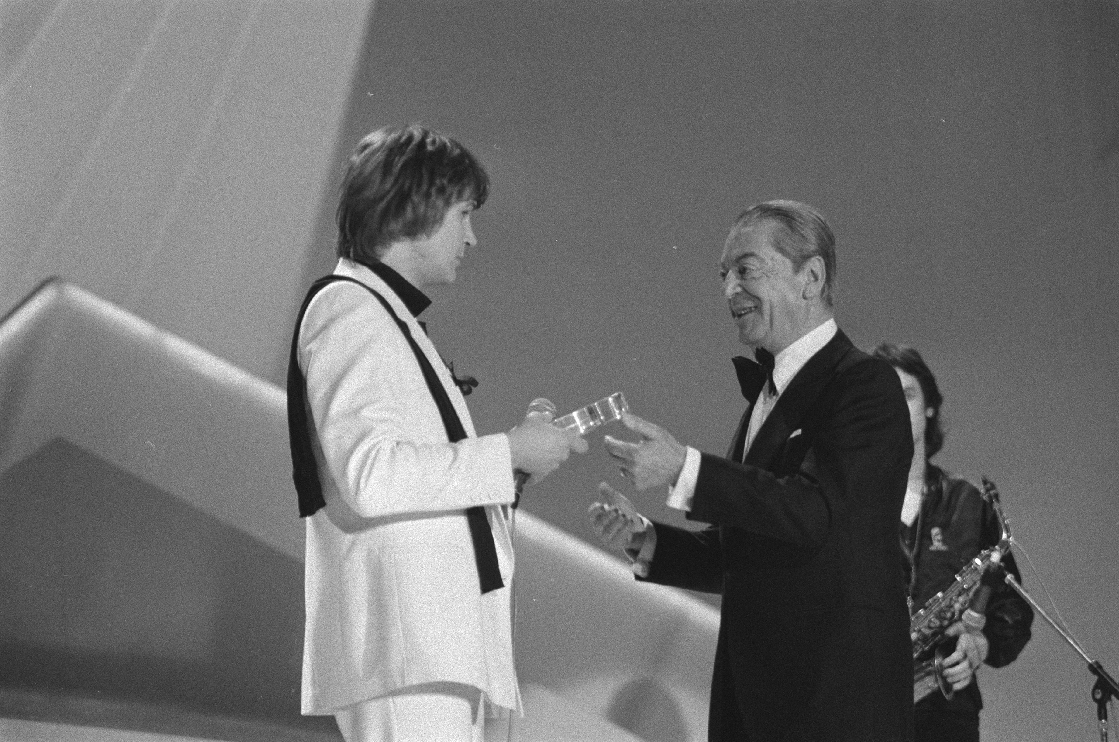 Collectie / Archief : Fotocollectie Anefo Reportage / Serie : [ onbekend ] Beschrijving : Eurovisie Songfestival 1980 ( Den Haag ); winnaar Johnny Logan krijgt prijs Datum : 19 april 1980 Locatie : Den Haag, Zuid-Holland Trefwoorden : Winnaars, prijzen, songfestivals Persoonsnaam : Johnny Logan Fotograaf : Dijk, Hans van / Anefo Auteursrechthebbende : Nationaal Archief Materiaalsoort : Negatief (zwart/wit) Nummer archiefinventaris : bekijk toegang 2.24.01.05 Bestanddeelnummer : 930-7807